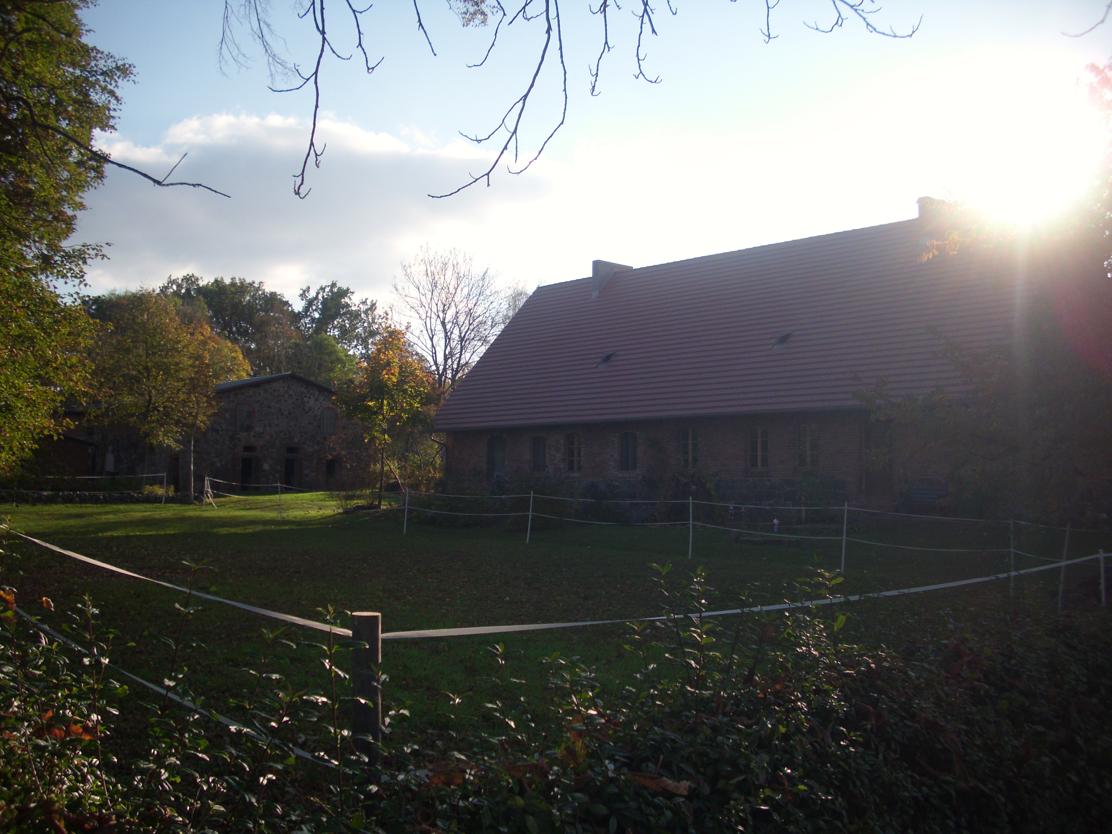 ehemaliges Forstarbeiterhaus, Reicherskreuz, Naturpark Schlaubetal, Brandenburg